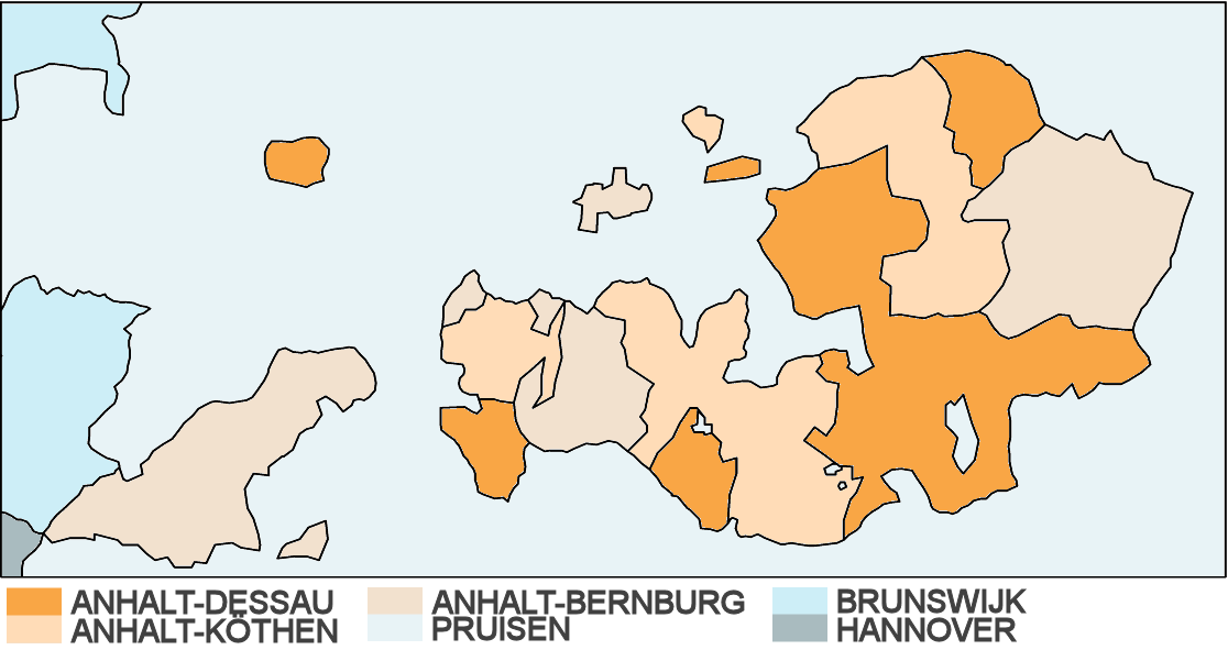 Anhalt in 1820 - zelf gemaakt gebaseerd op "kale" kaart